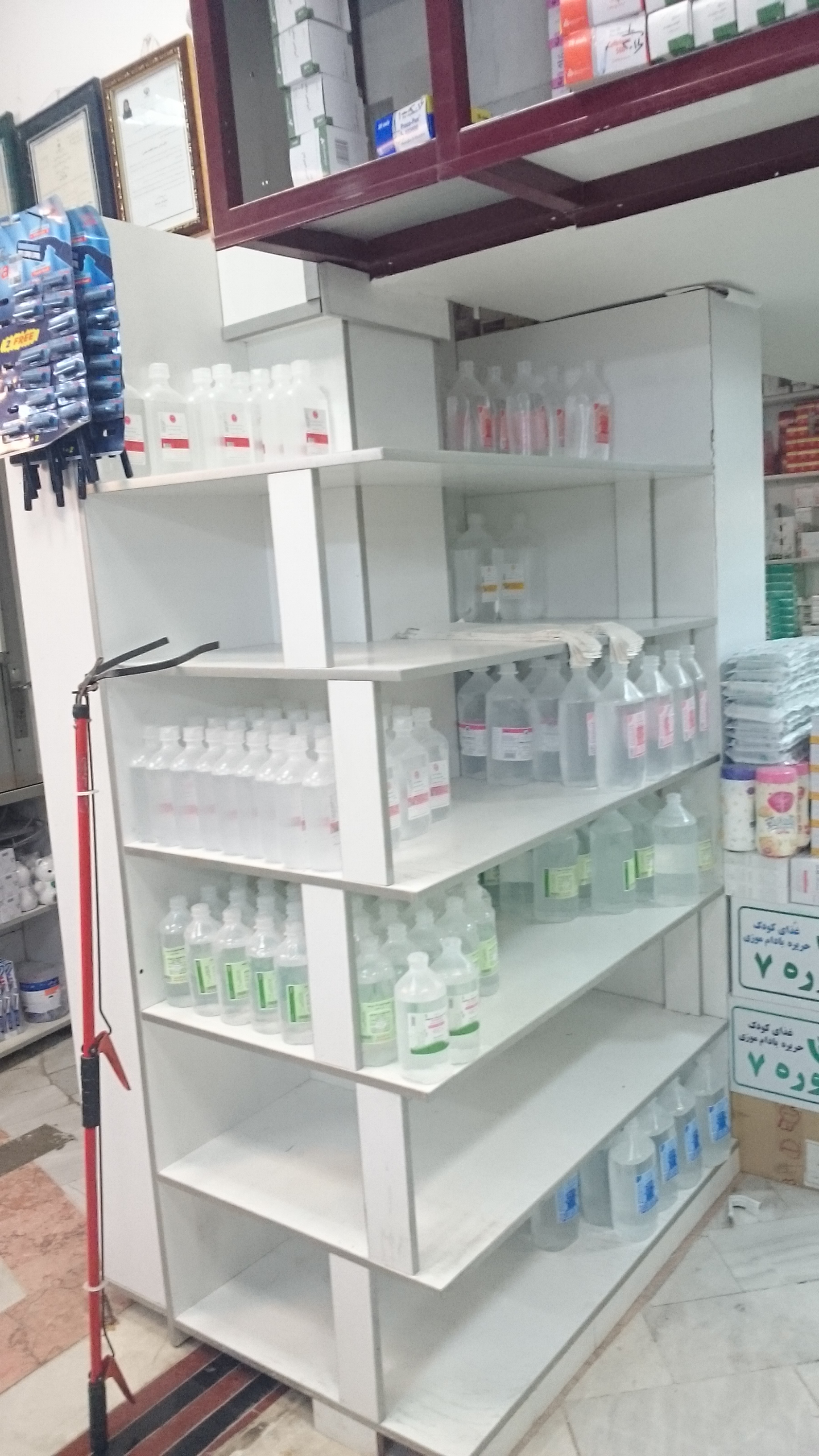 سرم های گوناگون